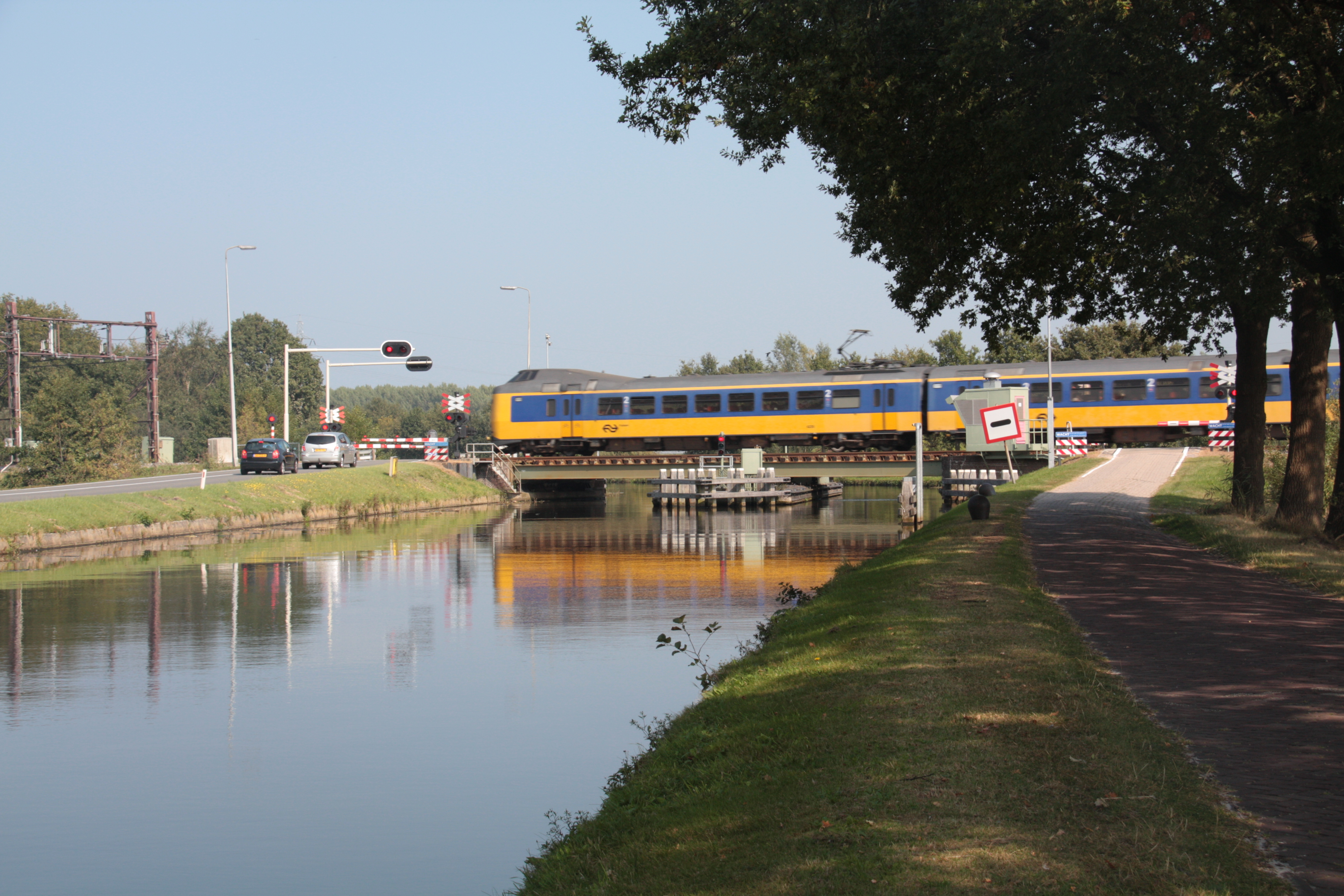 Roterende spoorbrug bij Meppel